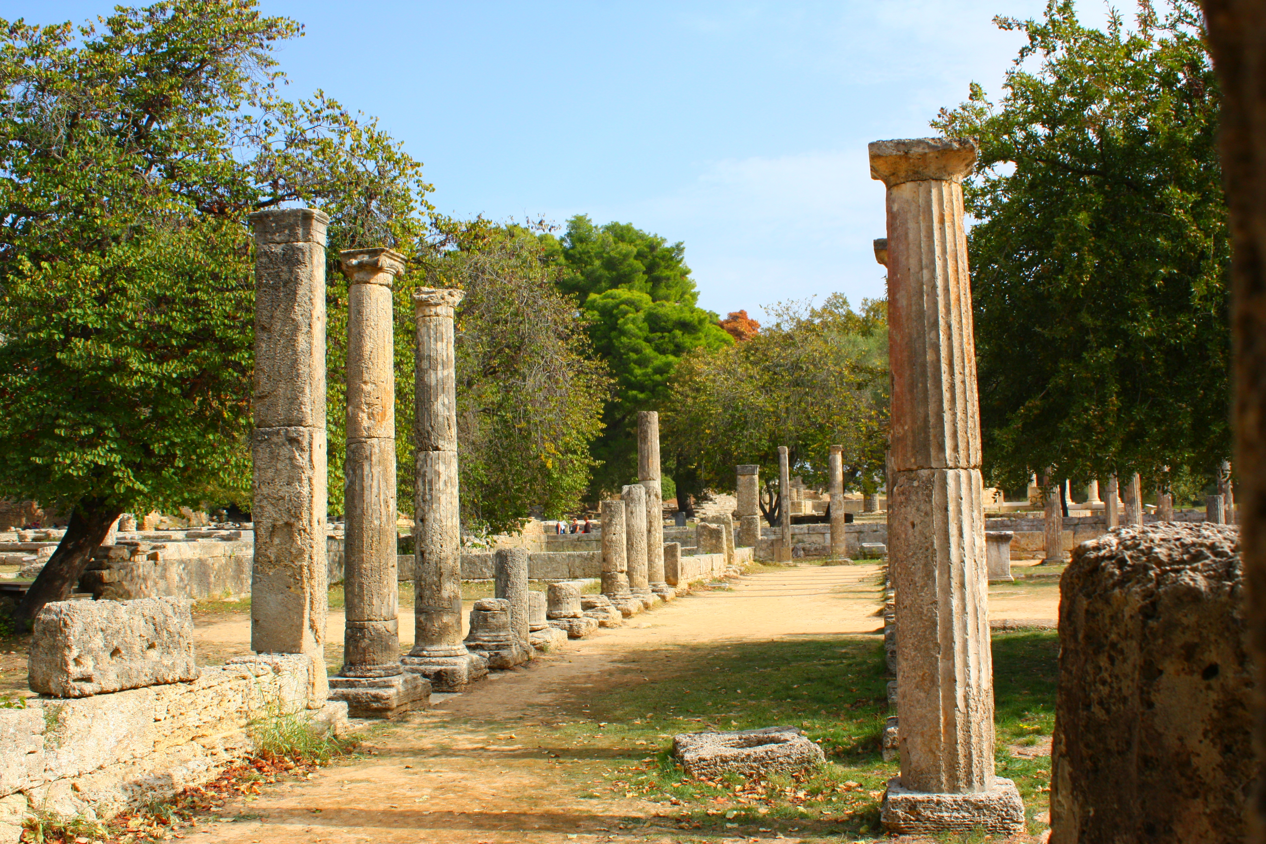 Olümpia romjai 04